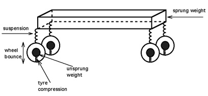 Car diagram